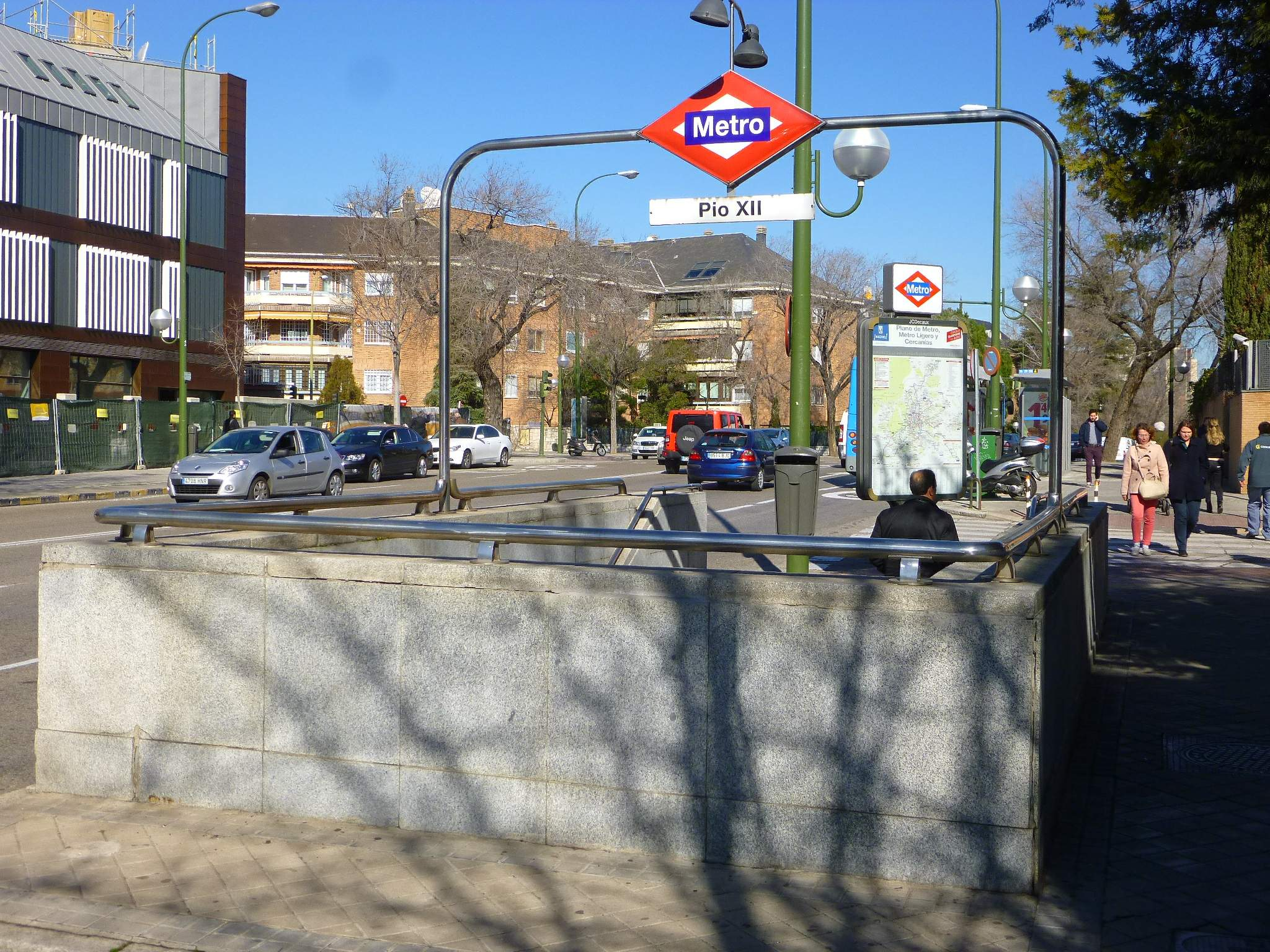 stación de Pío XII, del Metro de Madrid